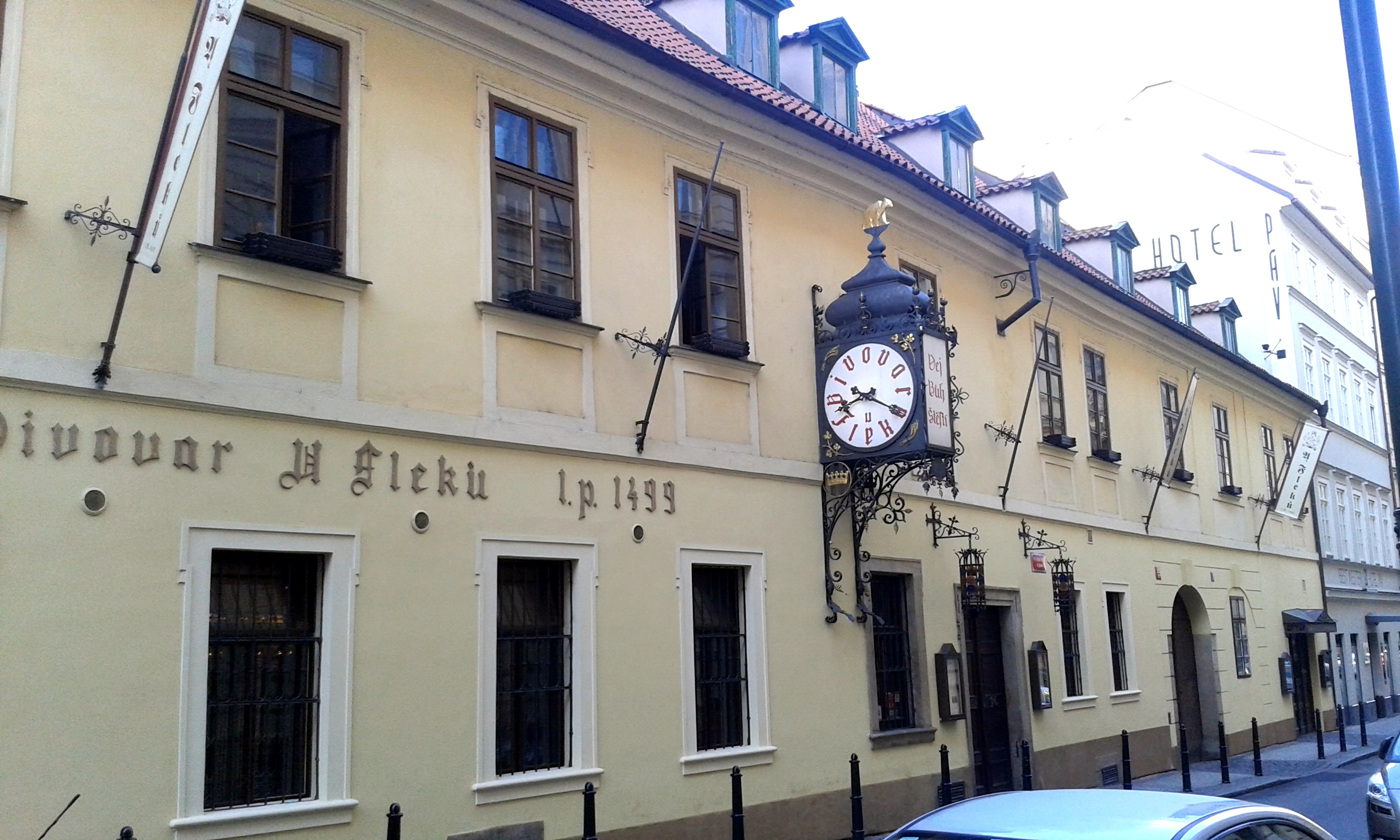 Pivovar U Fleků